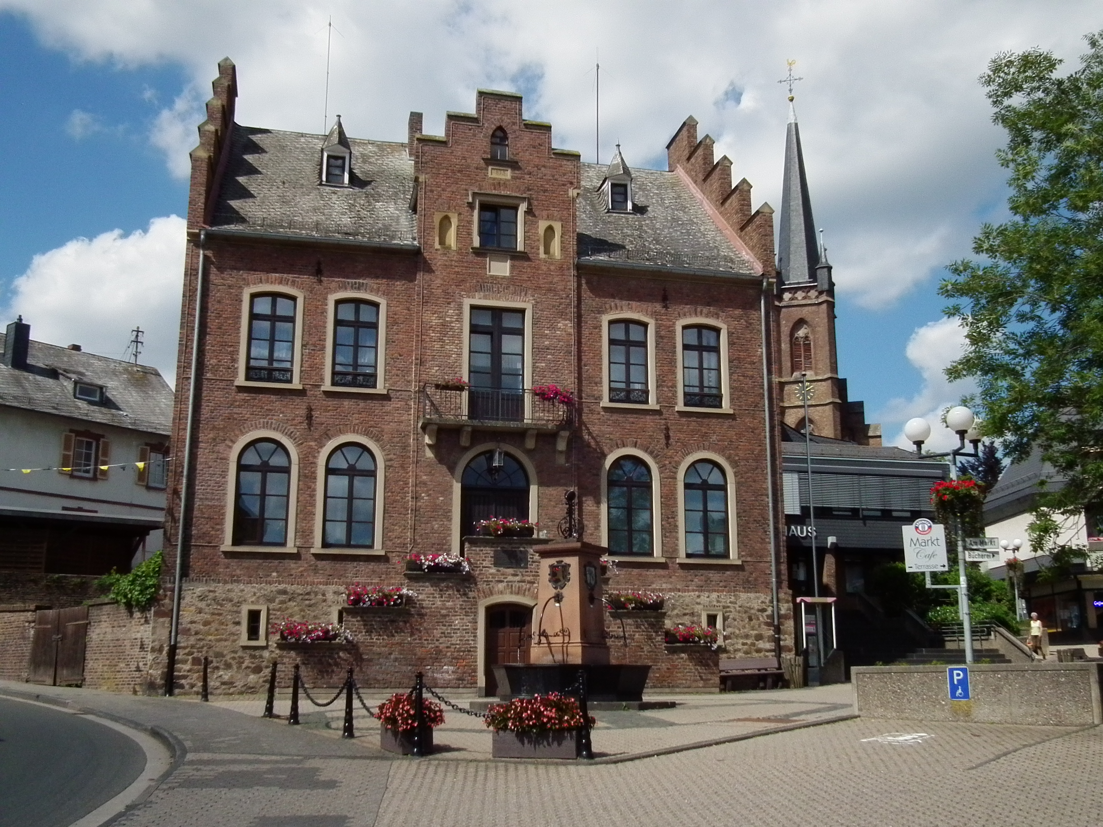 Das alte Rathaus mit Anbau, Marktbrunnen und im Hintergrund die katholische Kirche St. Erasmus in Rheinböllen (Rheinland-Pfalz, Deutschland)